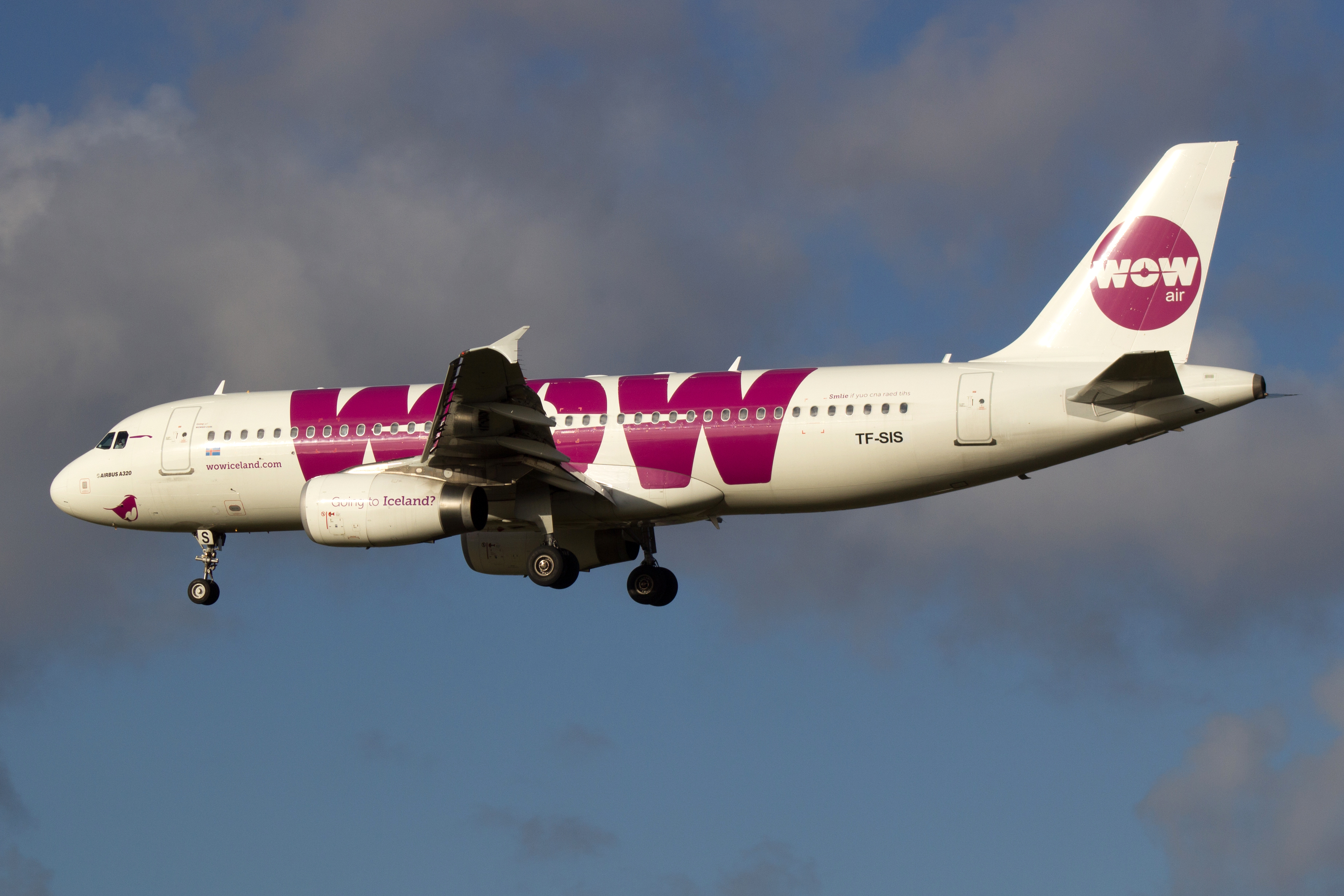 Airbus A320 de WOW Air aterrando no aeroporto de Copenhague.